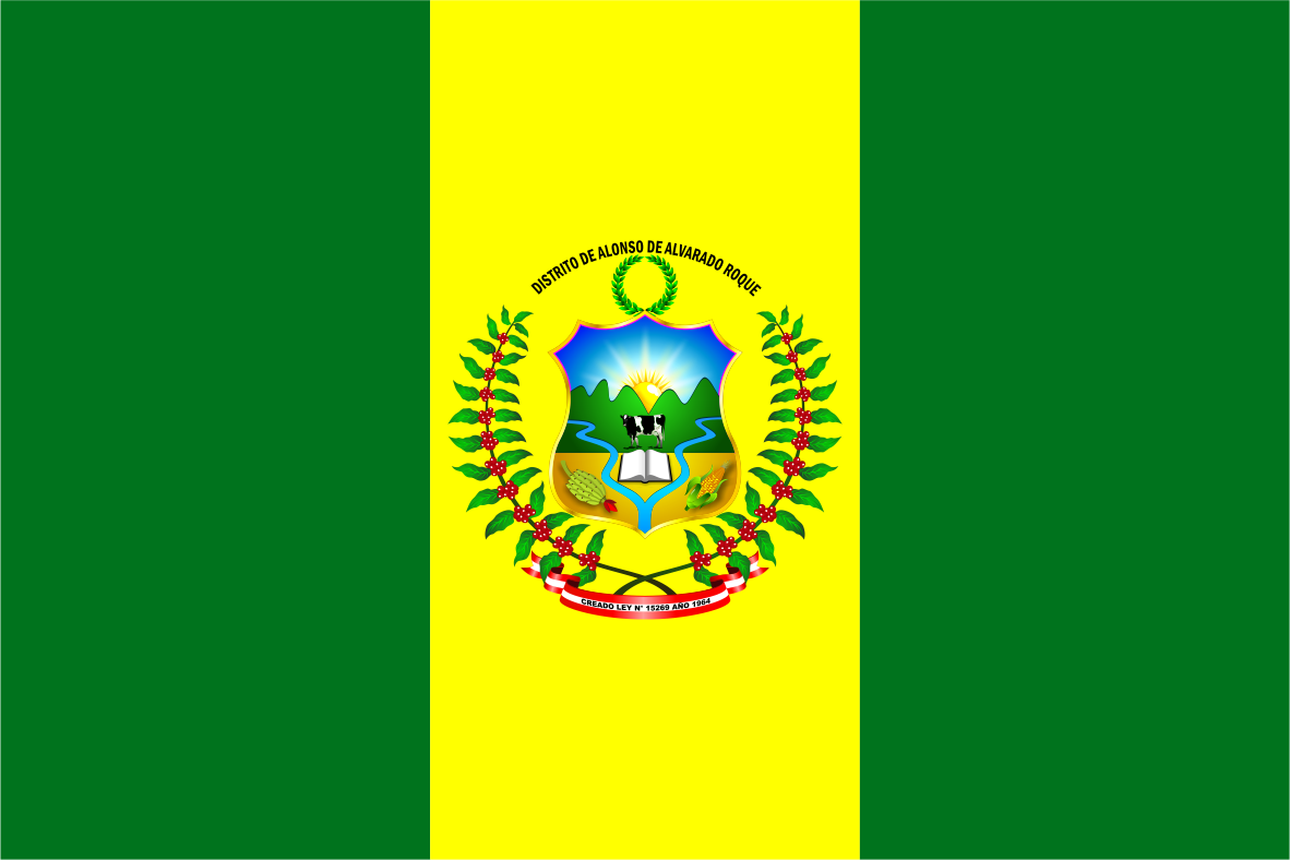 Distrito de Alonso de Alvarado - Provincia de Lamas - Región San Martín